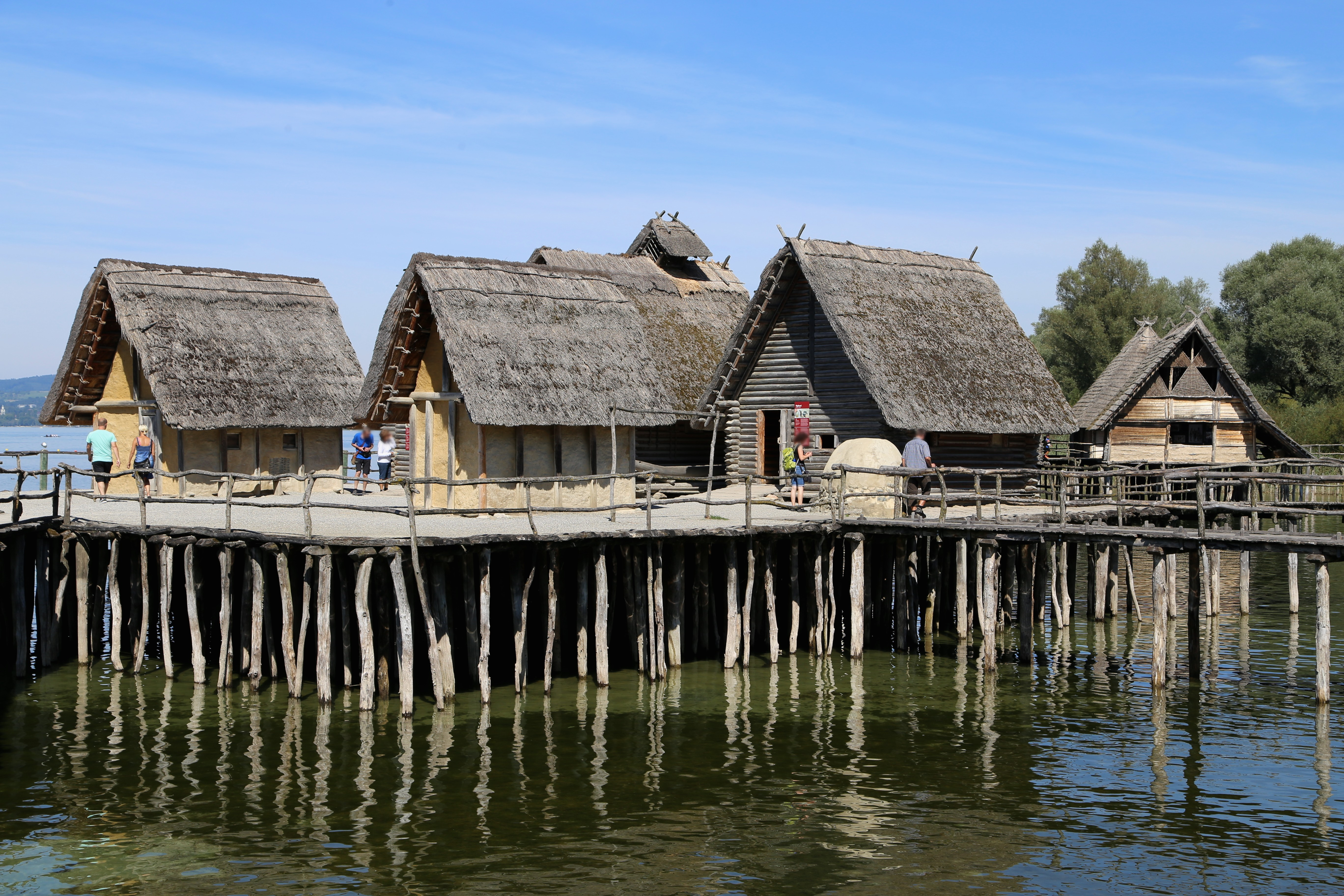 Pfahlbaumuseum Unteruhldingen, Freilichtmuseum am Bodensee, in der Gemeinde Uhldingen-Mühlhofen